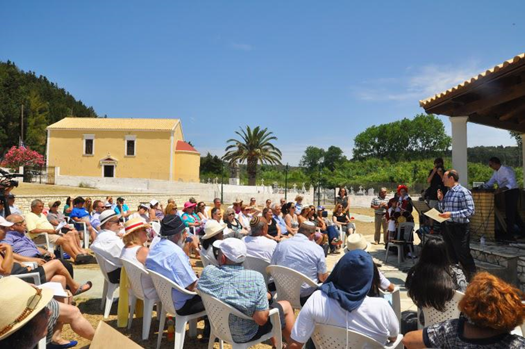 גלעד יפת באריקוסה